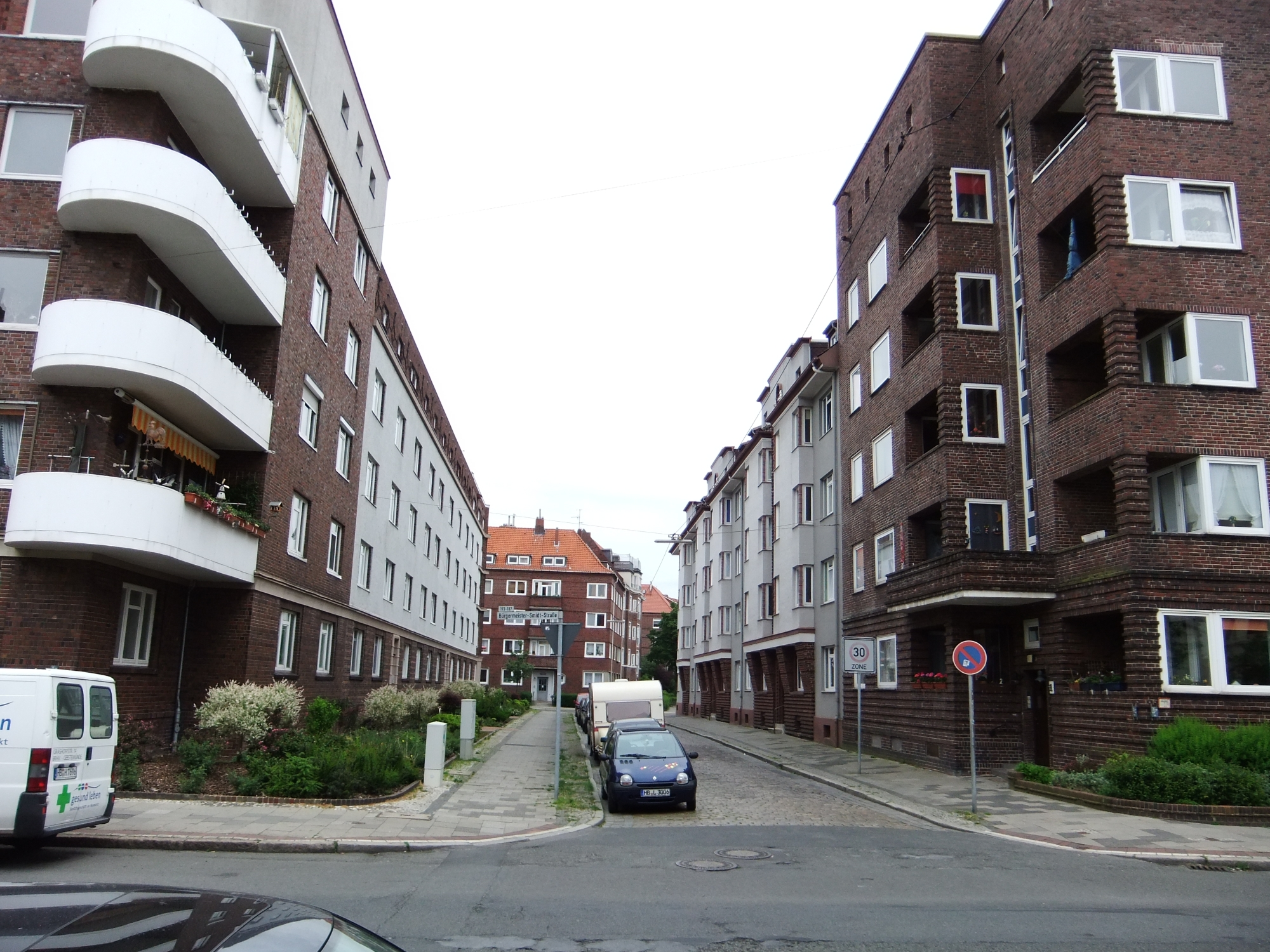 Wohnhausgruppe der Gemeinnützigen Wohnungsfürsorge in Bremerhaven, Hardenbergstraße von der "Bürger" aus. Die Denkmalgruppe ist ein geschütztes Kulturdenkmal in der Freien Hansestadt Bremen, mit der Nr. 3274 beim Landesamt für Denkmalpflege registriert.